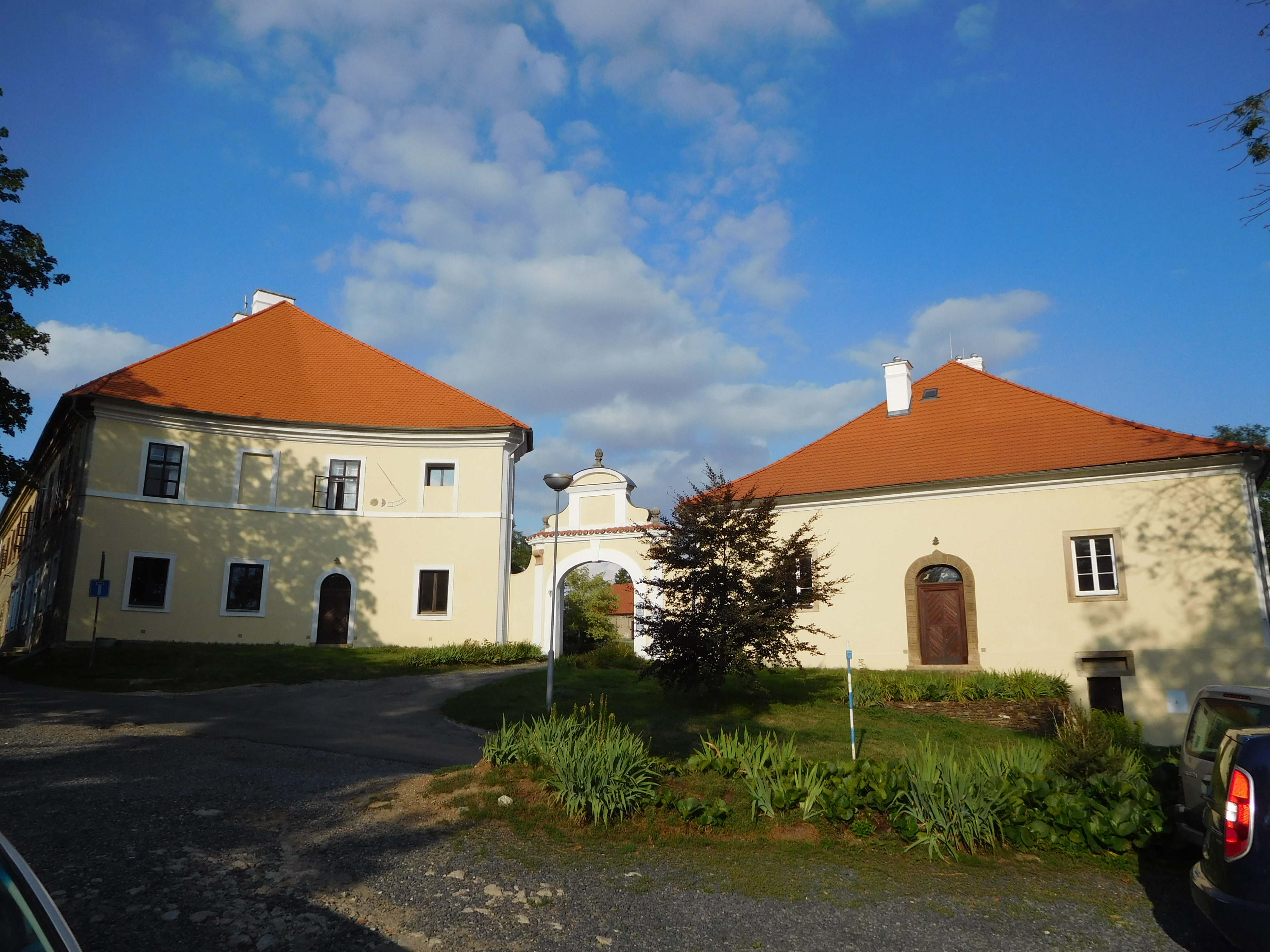 Škvorec - Nový zámek